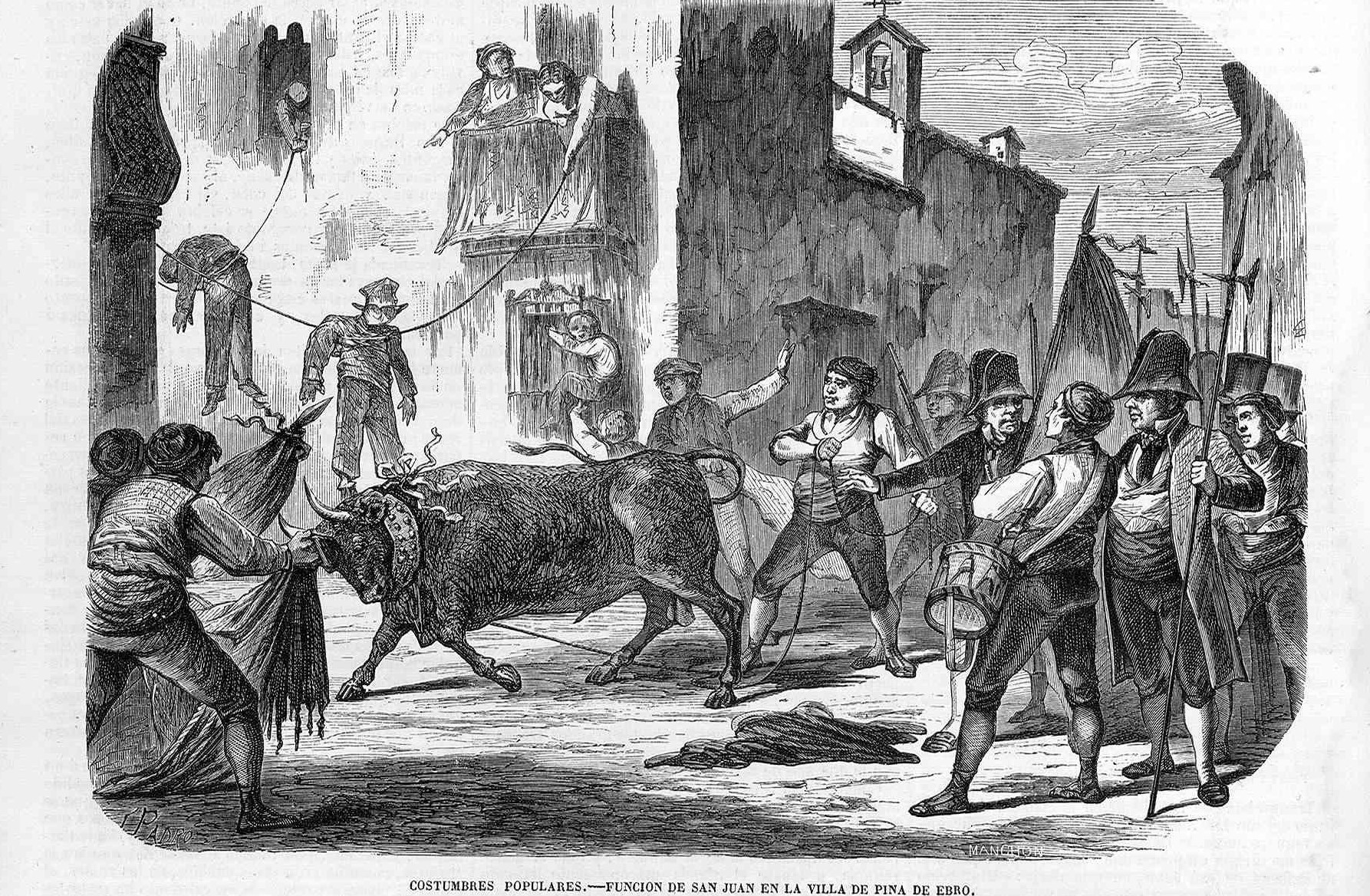 Costumbres Populares - Función de San Juan en la villa de Pina de Ebro